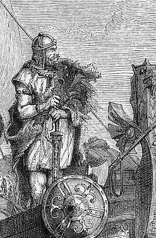 Geiserich (390-477), König der Vandalen (428-477), Überfahrt nach Afrika (455, coming back from sacking Rome), Holzgravur